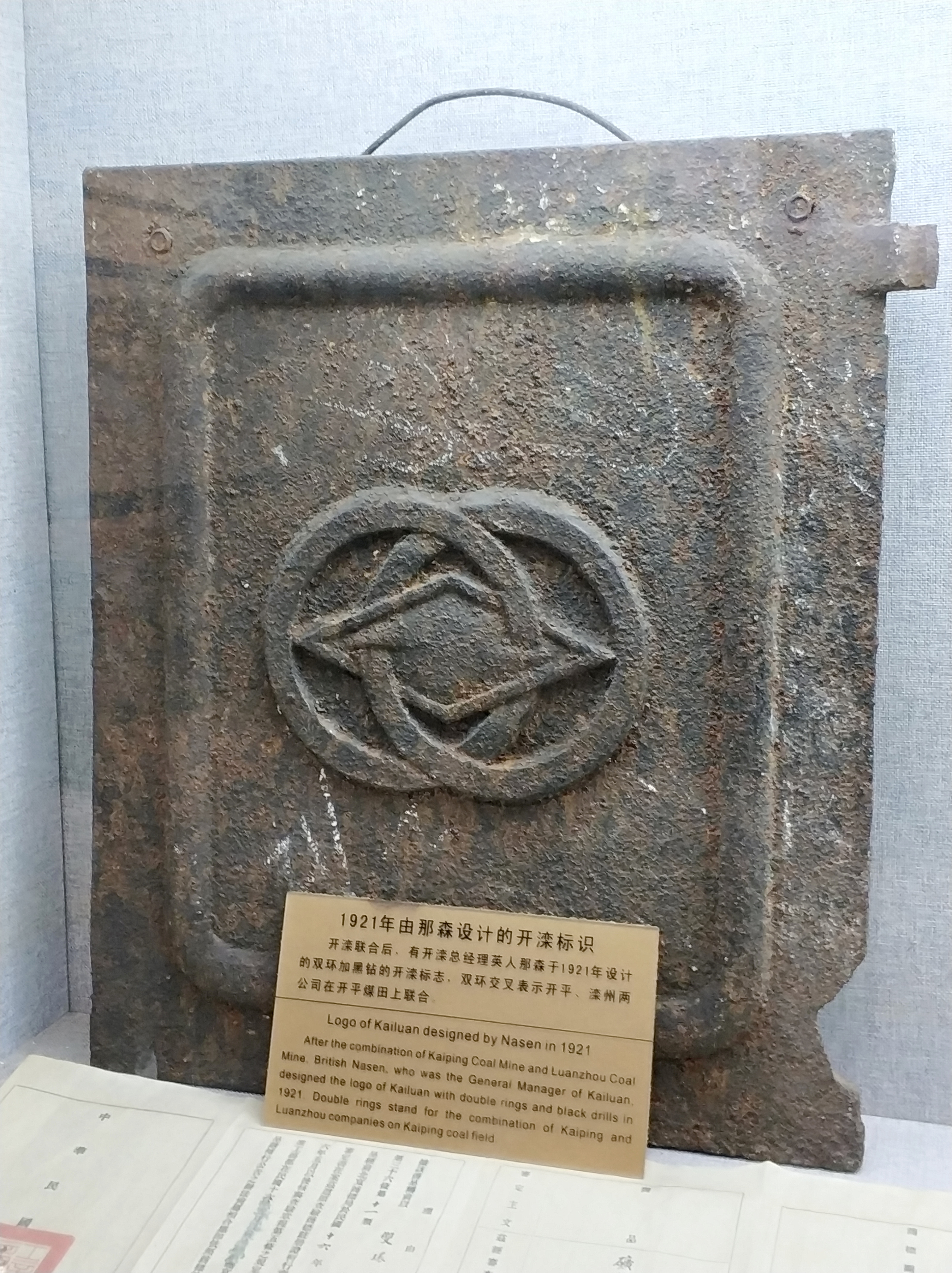 中文（中国大陆）: 唐山开滦国家矿山公园开滦博物馆展览